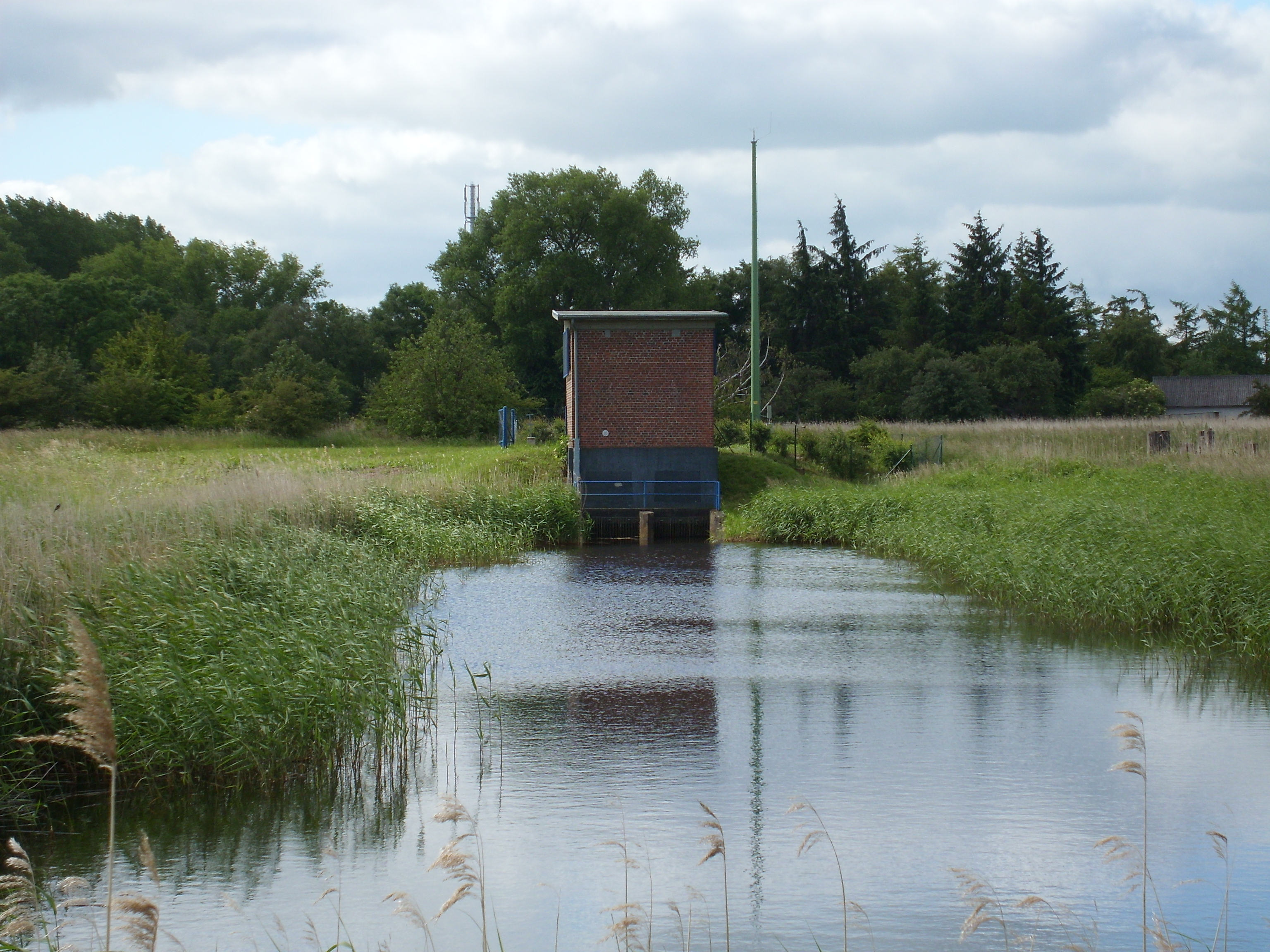 Schöpfwerk Eisenhammer beim Polder Eisenhammer nördlich des Ryck